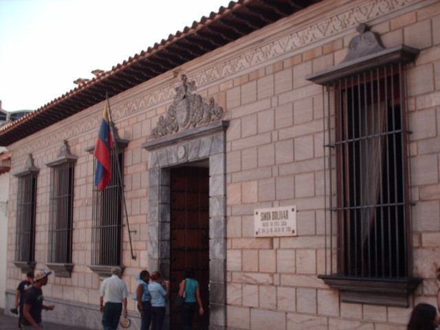 Fachada Casa natal del Libertador Simón Bolívar, Caracas